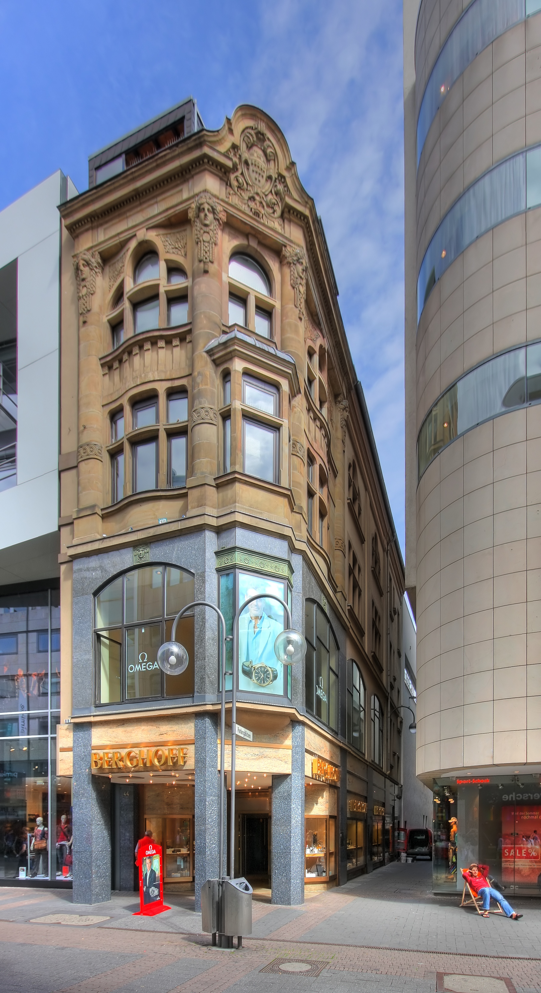 Haus Schierenberg - Schildergasse Ecke Perlengäßchen in Köln. Ein Schild am Haus besagt: Haus Schierenberg Erbaut 1894 von Baumeister und Architekt Heinrich Schierenberg. Teilweise zerstört im 2. Weltkrieg Wiederaufbau ab 1950 Restauriert 1992/1993 Unter Denkmalschutz 1990 Nr. 5753 This is a photograph of an architectural monument.